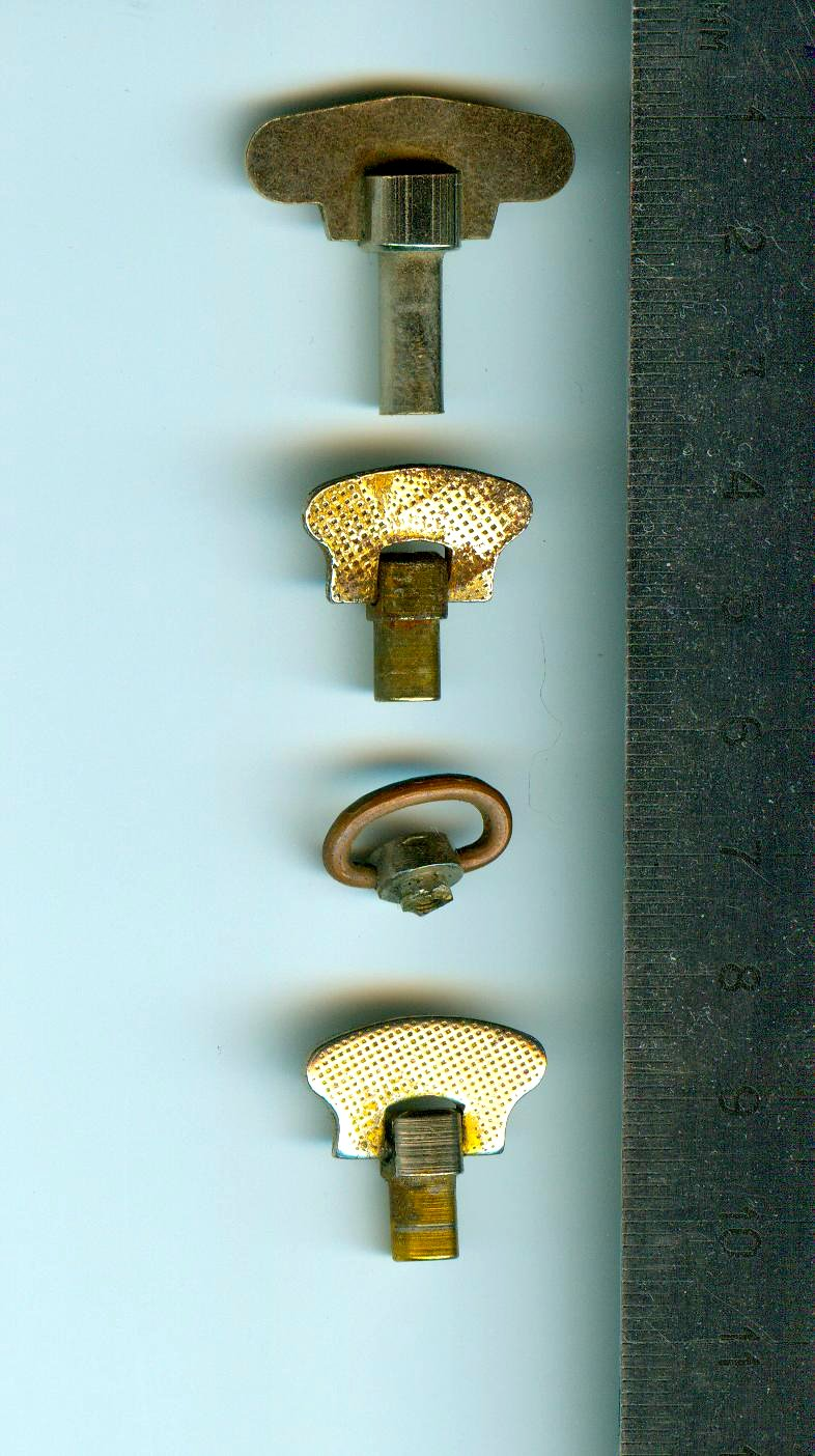 Klucz naciągowy nakręcany do nakręcania sprężyny zagara